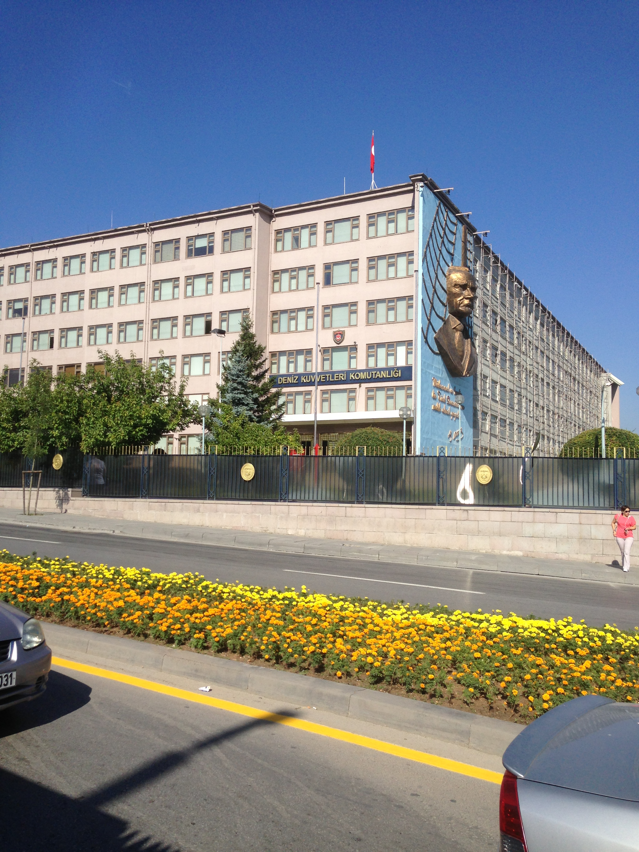 Ankara'da Deniz Kuvvetleri Komutanlığı binası.